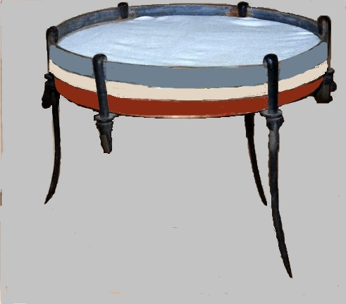 La balle au tamis (ou balle au tambour) est un jeu de gagne-terrain. Le tamis est placé à 7 mètres de la ligne de fond et il sert exclusivement pour la livrée. Le tamis est constitué d'un cercle de fer de 40 centimètres de diamètre avec 3 pieds et placé à une hauteur de 20 cm. Le livreur fait rebondir la balle sur le tamis et la rattrape quelques mètres plus loin pour la frapper.Walon: Li tamis est metou a 7 metes do ptit djeu et il n’ sieve ki po rivler (livrer). Il est fwait d’ on ceke di fier, 40 cintimetes lådje, metou 20 cm hôt, so 3 pîs. Le rivleu (livreu) doet fé rdjibler li ptite bale sol tamis eyet l’ ratraper kékes metes pus lon po bouxhî dsu.